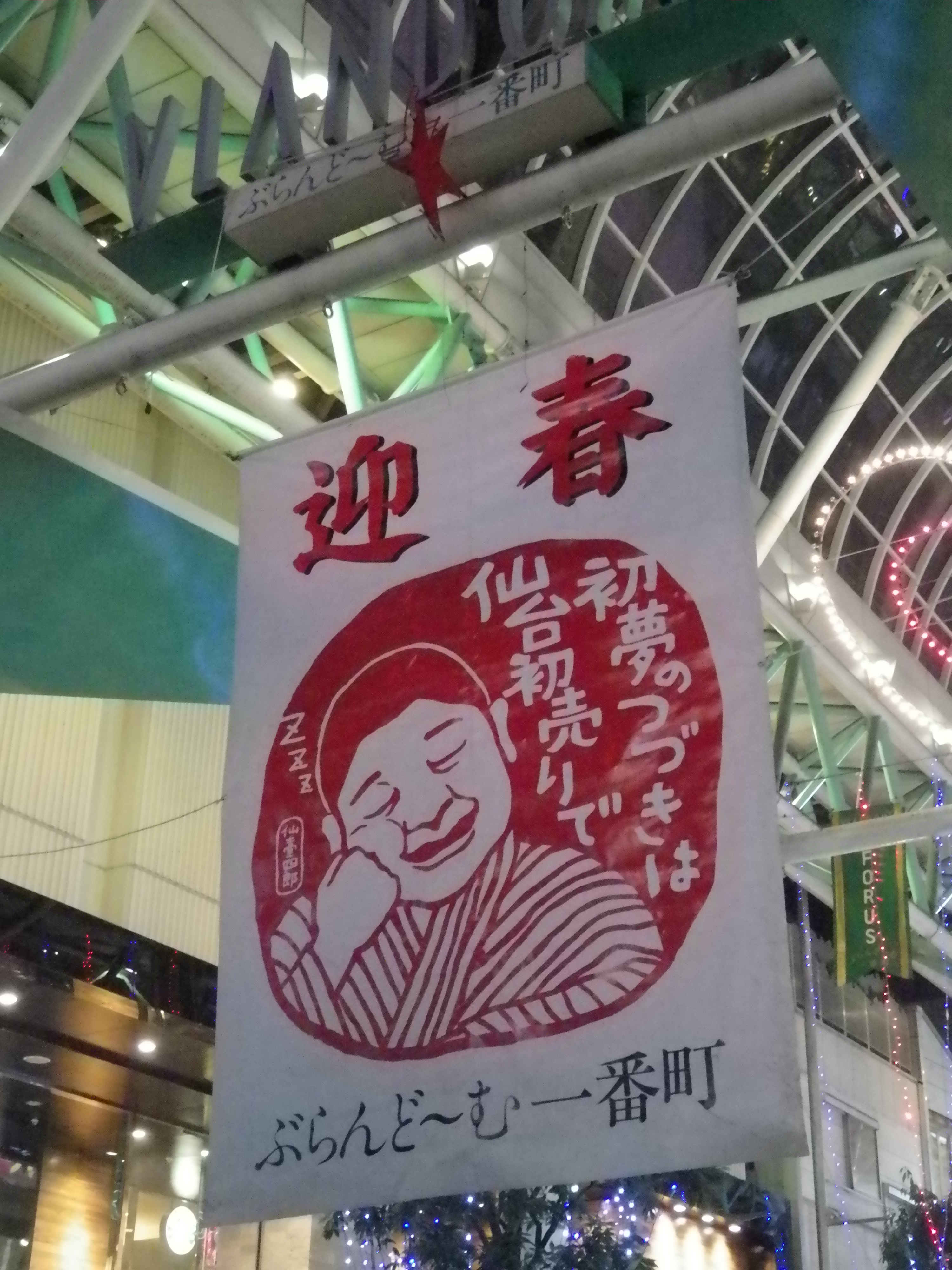 「仙台初売り」のイメージキャラクター「仙台四郎」の幟